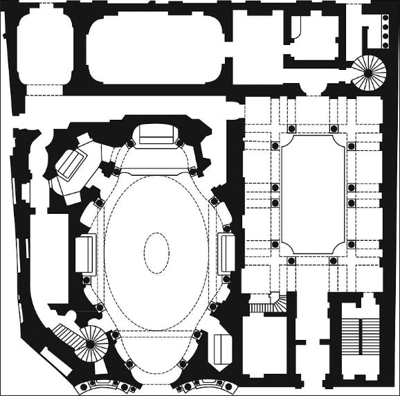 Ο ναός Σαν Κάρλο Αλλέ Κουάτρο Φοντάνε